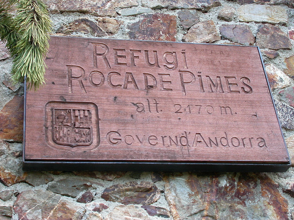 Refuges Andorre